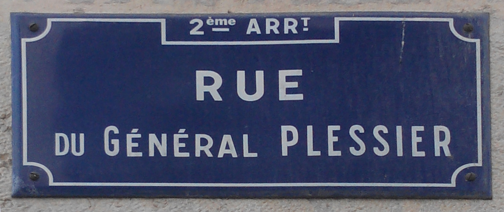 Plaque de la rue du Général Plessier, dans le 2e arrondissement de Lyon.